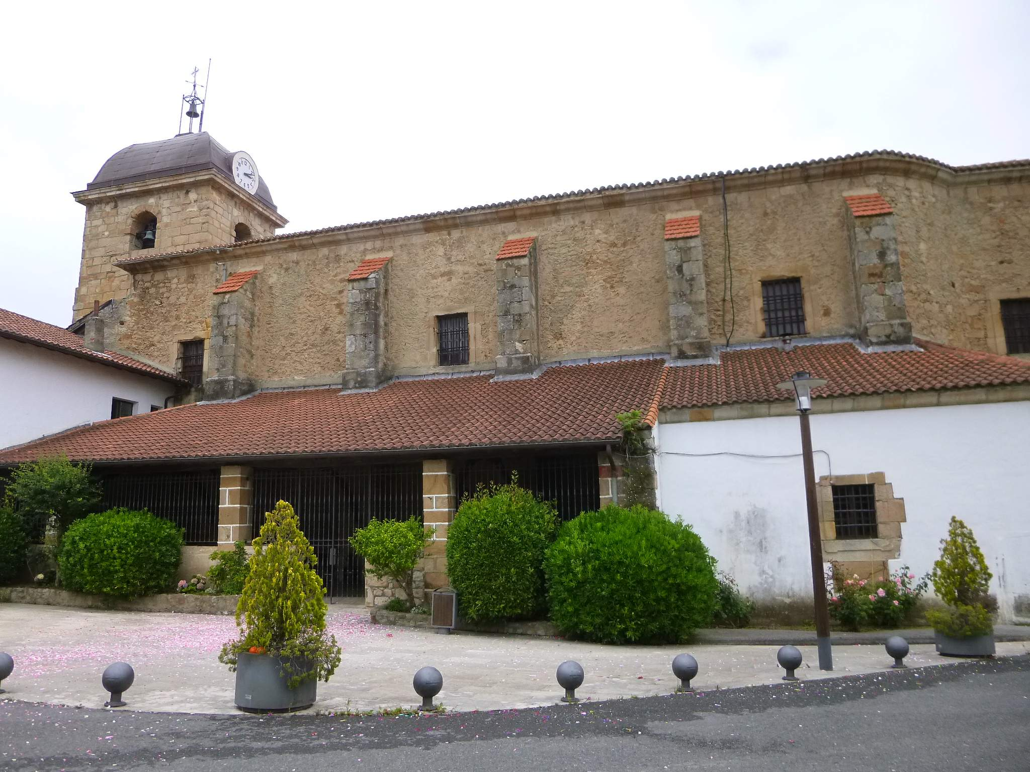 Urduliz (Bizkaia) - Iglesia de Santa María